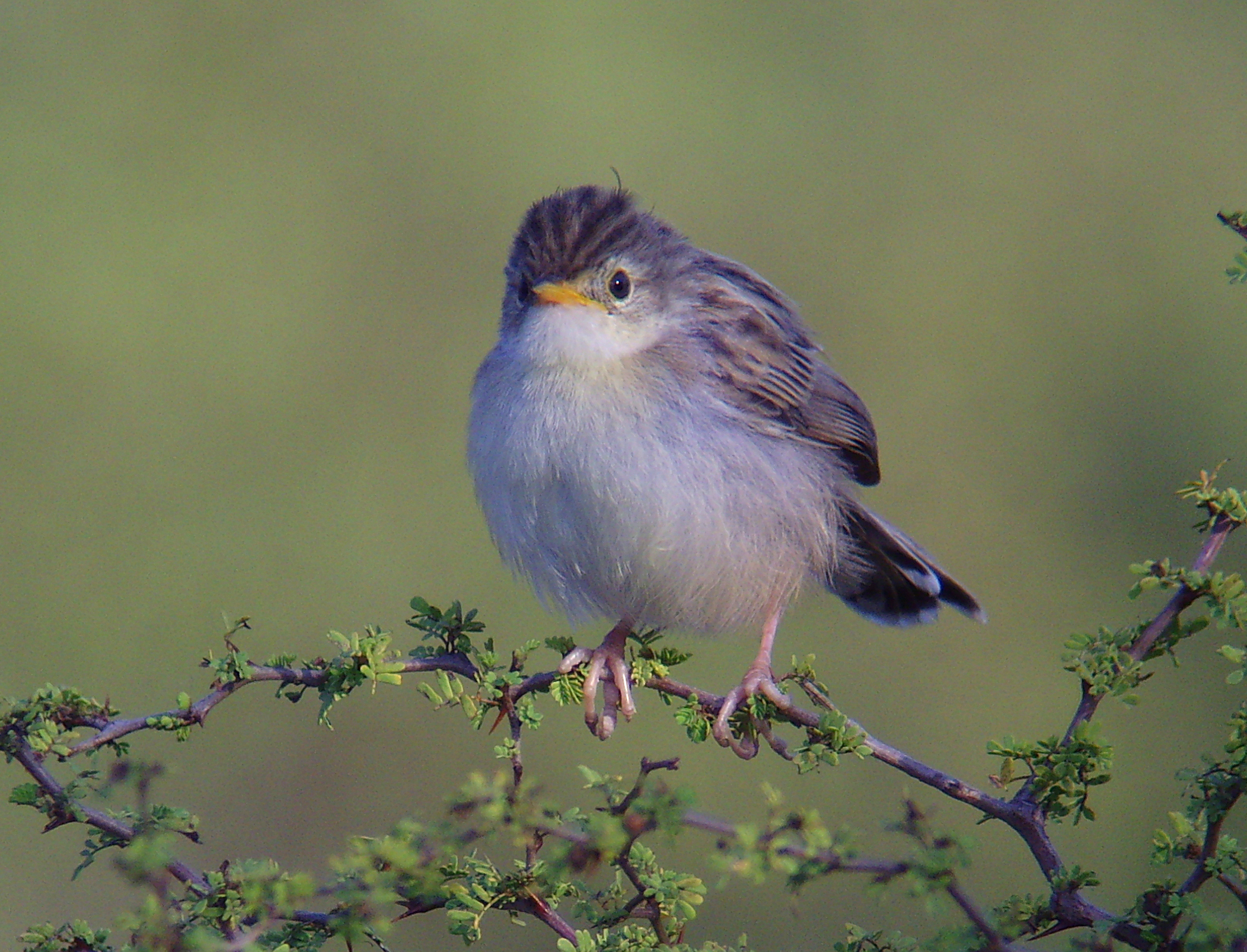 Cisticola cherina - Madagascar